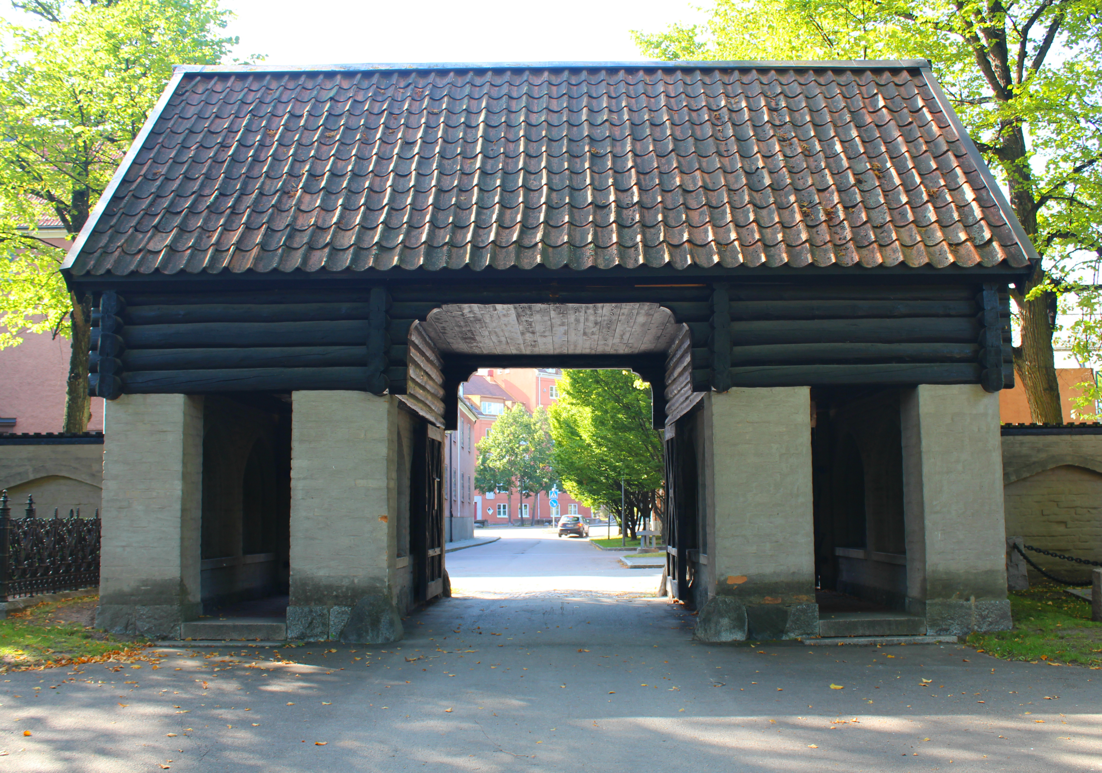 Portal Östra kapellet03 Västerås 21420000014701